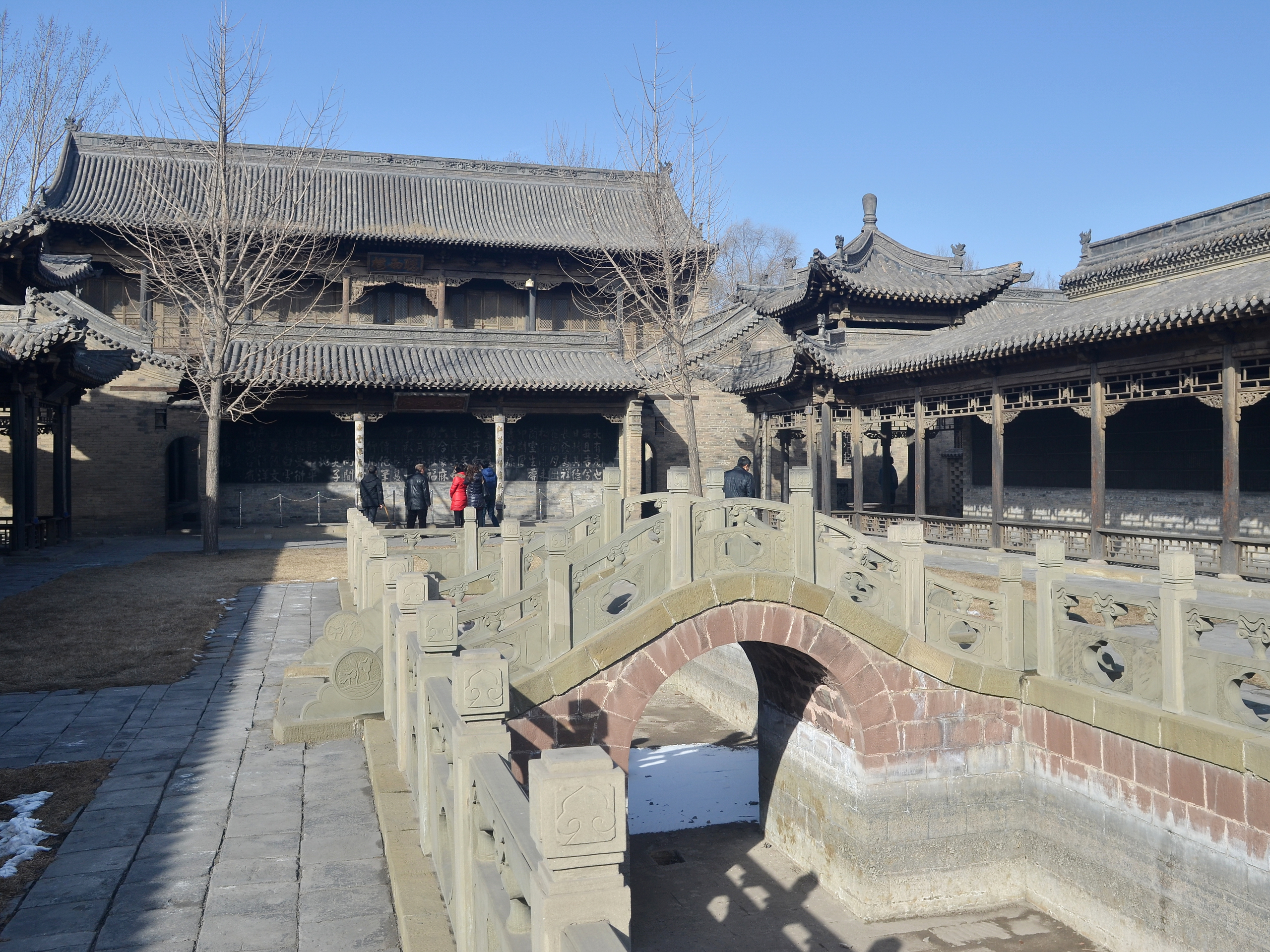 中文（中国大陆）: 常家庄园石云轩书院内东廊、正廊以及其后的听雨楼